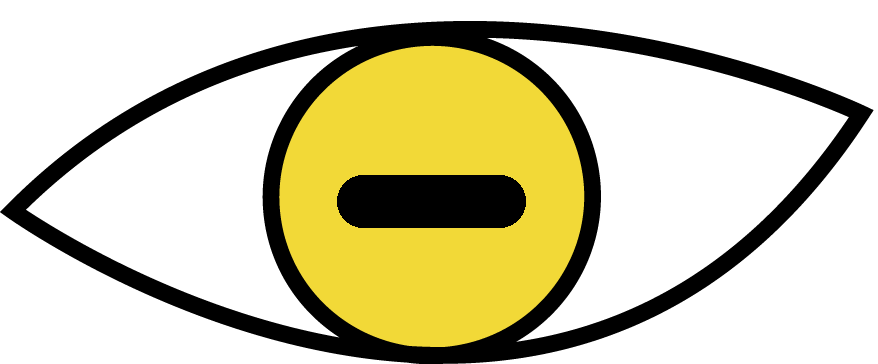 Ojo en modo hermitaño, de la serie "Naruto".